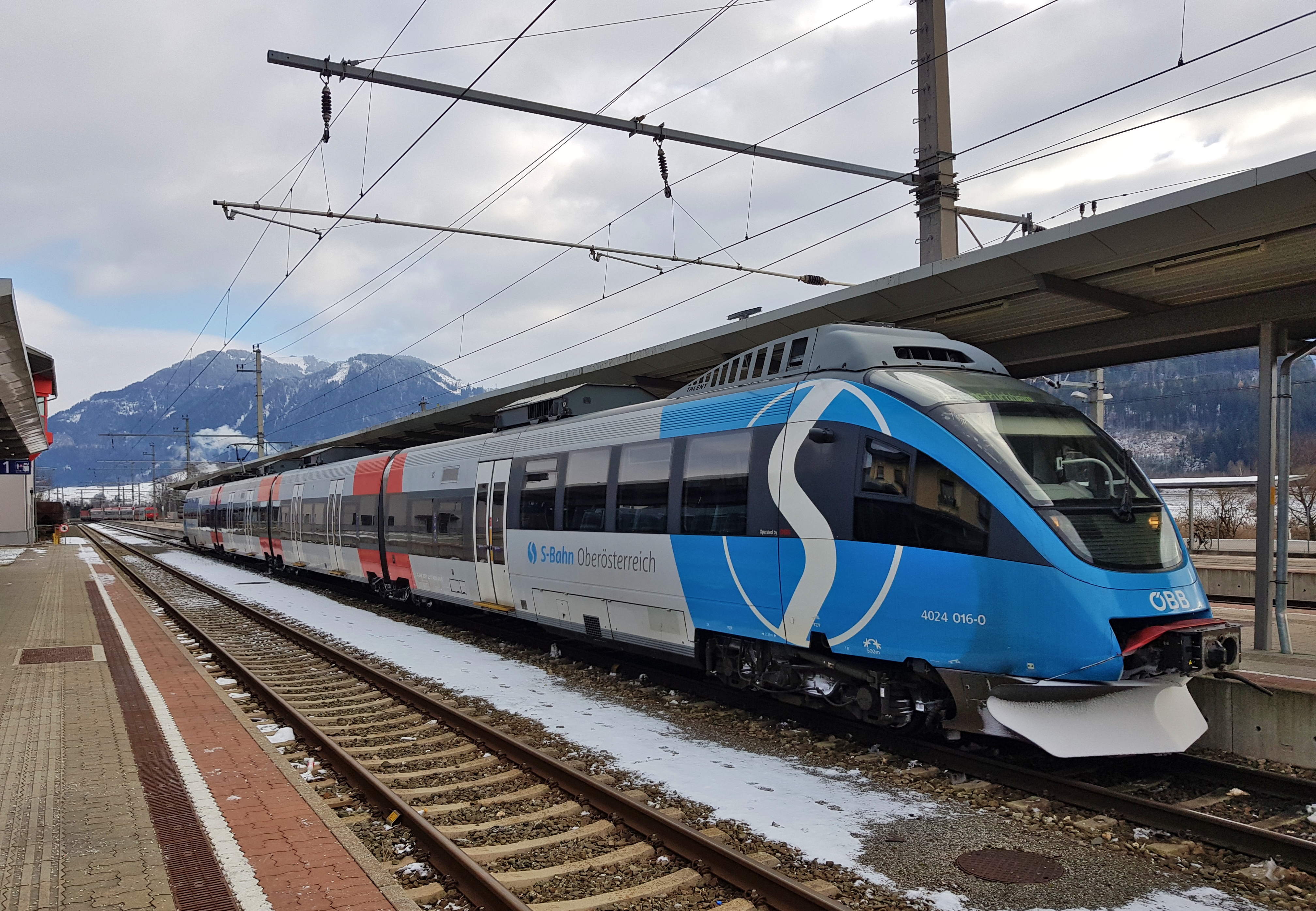 ÖBB 4024 016 mit Werbung für die S-Bahn Oberösterreich steht im Bahnhof Stainach-Irdning